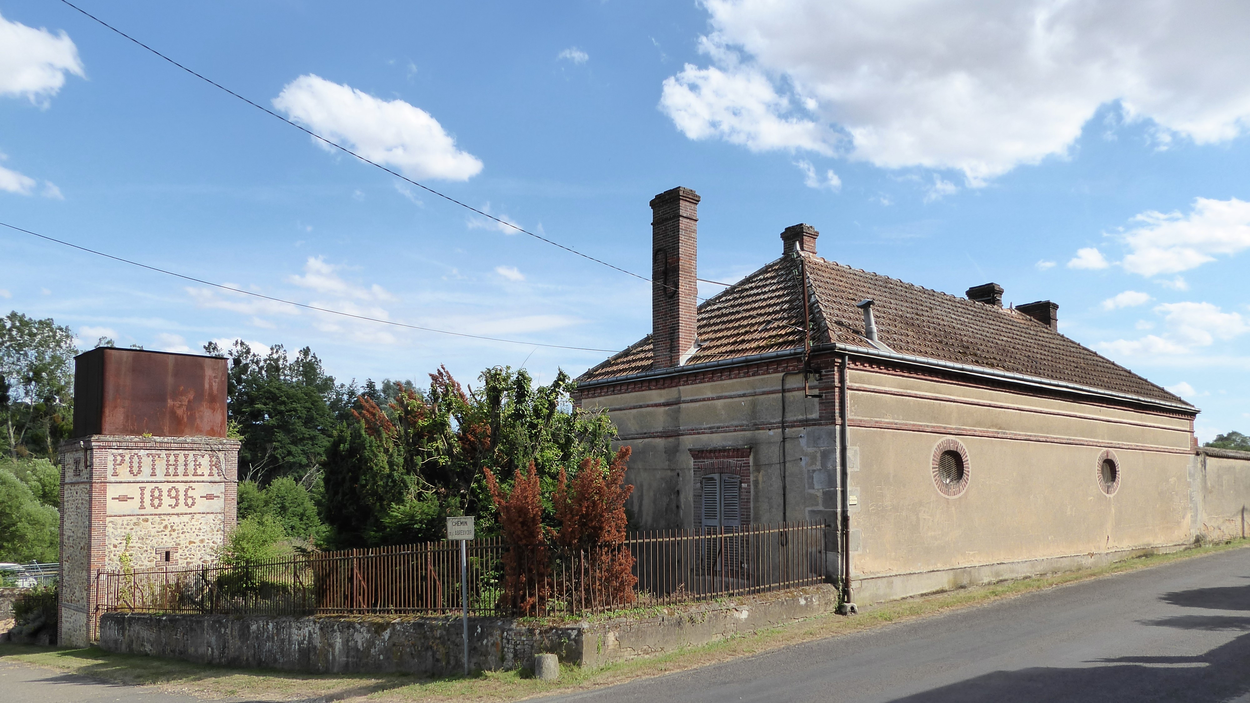 bâtiment de l'ancienne machine hydraulique de Crécy-Couvé, Eure-et-Loir, France.